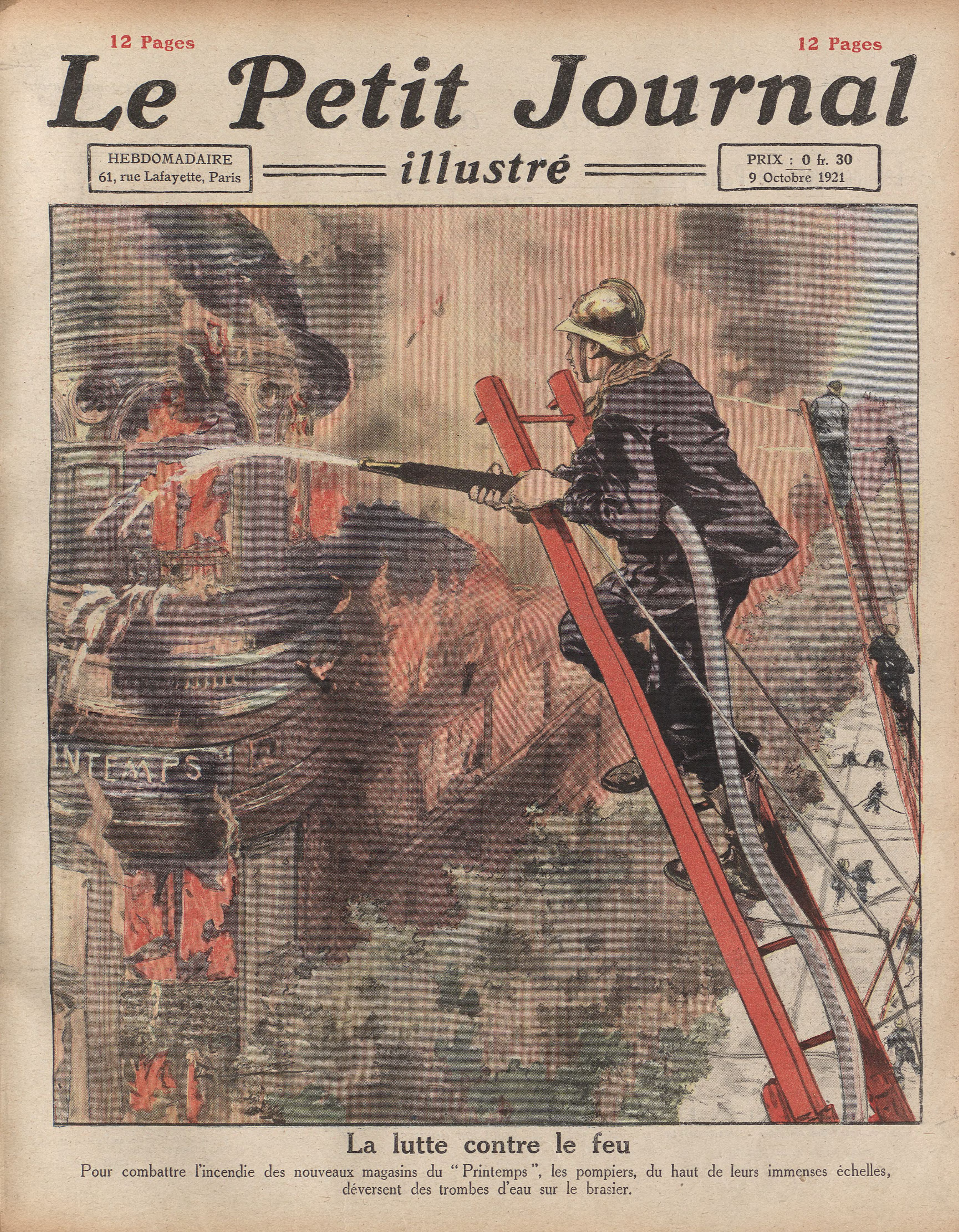 Incendie du Printemps le 28 septembre 1921 (illustration parue dans Le Petit Journal illustré)